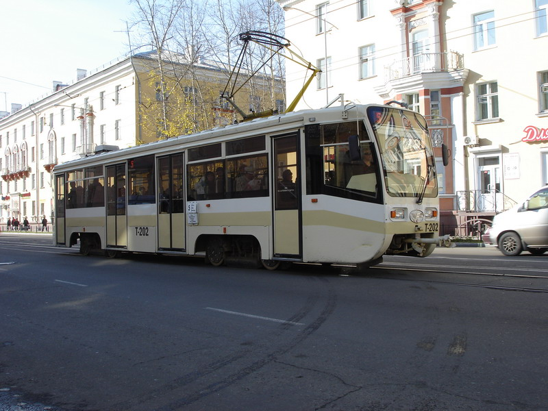 Tramwaj w Angarsku.